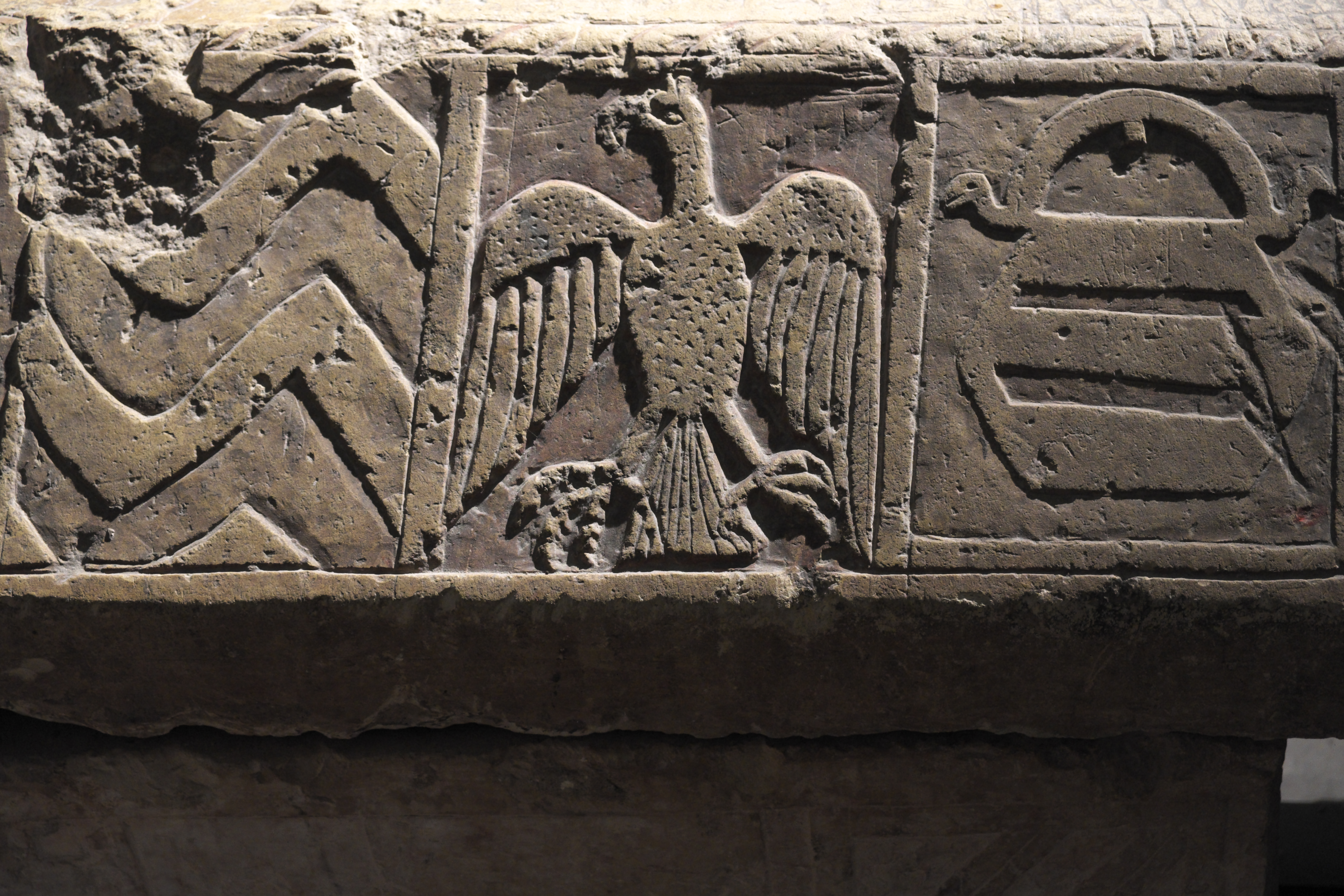 Kirche des ehemaligen Prämonstratenserklosters Santa María la Real in Aguilar de Campoo in der Provinz Palencia (Kastilien-León/Spanien), Wappen auf dem Deckel eines Sarkophages, Darstellung: Adler